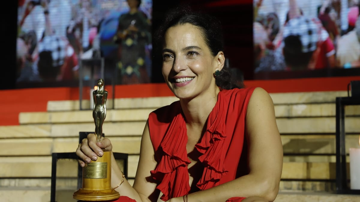 Recibiendo la estratuilla a mejor actriz Protagonica de serie